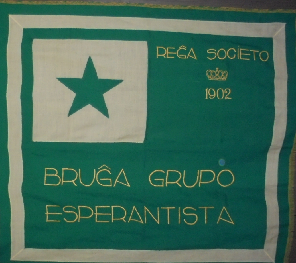 Vlag (170 x 180 cm) van de koninklijke vereniging 'Brugse Esperanto-Groep - Bruĝa Grupo Esperantista'